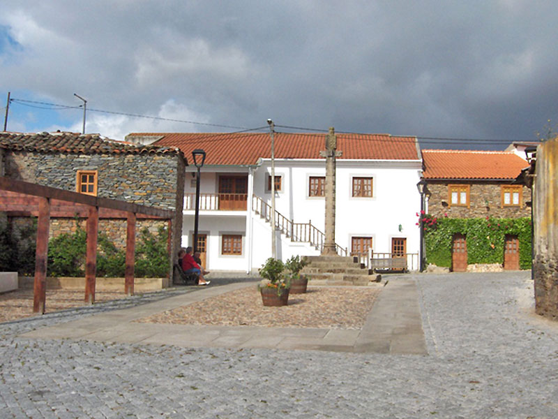 Largo do Pelourinho, Frechas, Portugal.